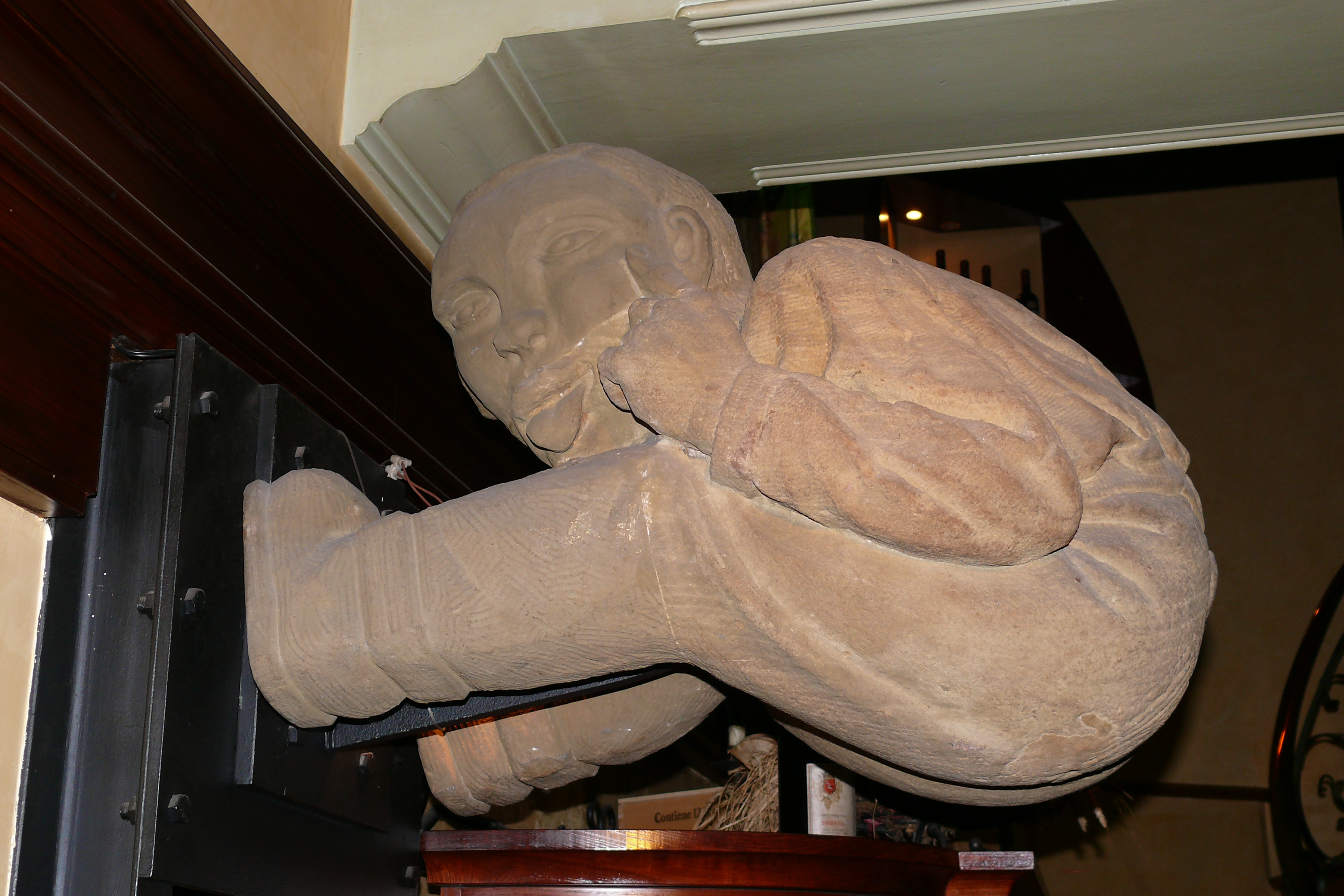 Brückenmännchen in Bonner Gaststätte („Ristorante Rossi”, Wilhelmstraße 22)